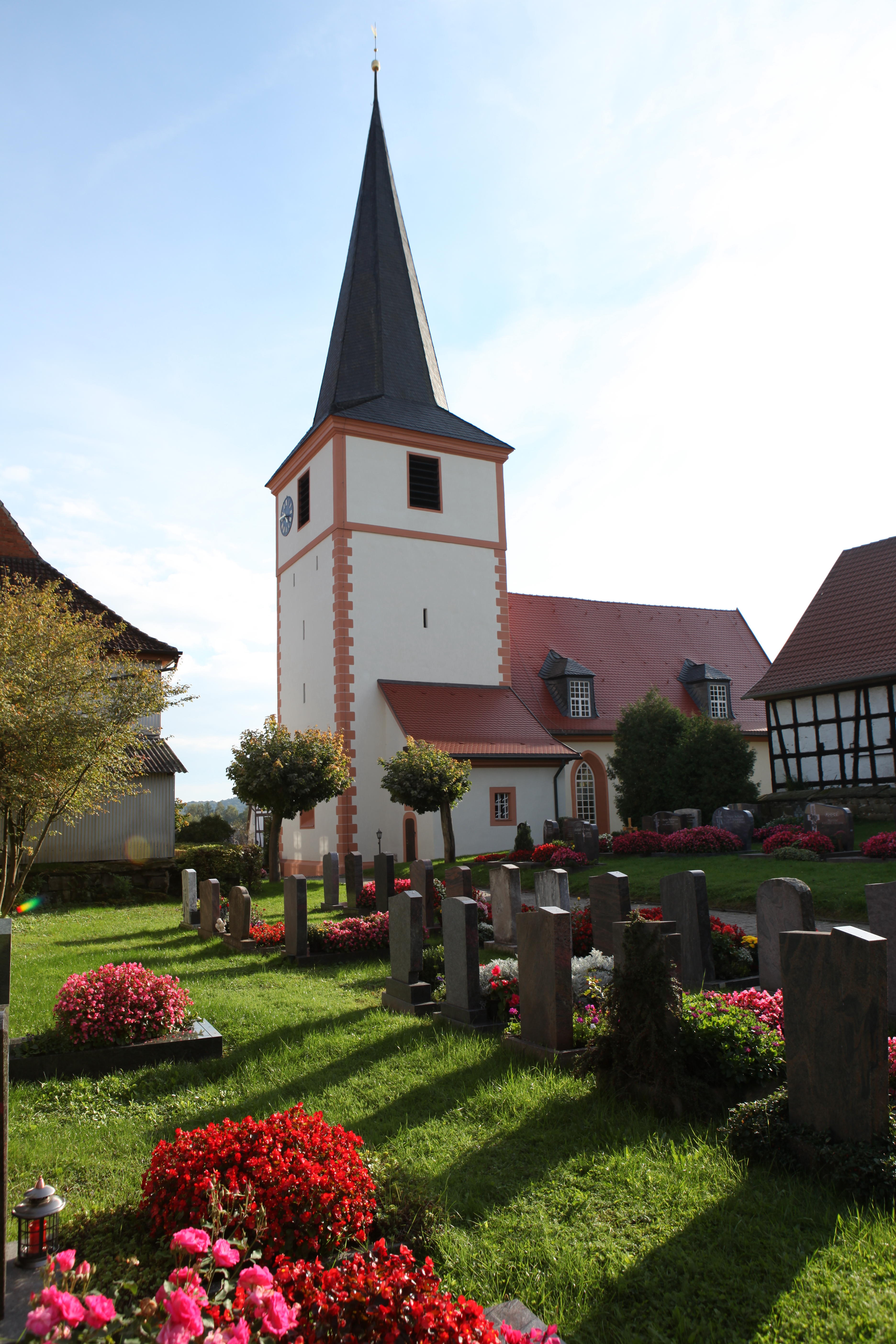 Evangelische Margarethenkirche in Rossfeld, Landkreis Coburg